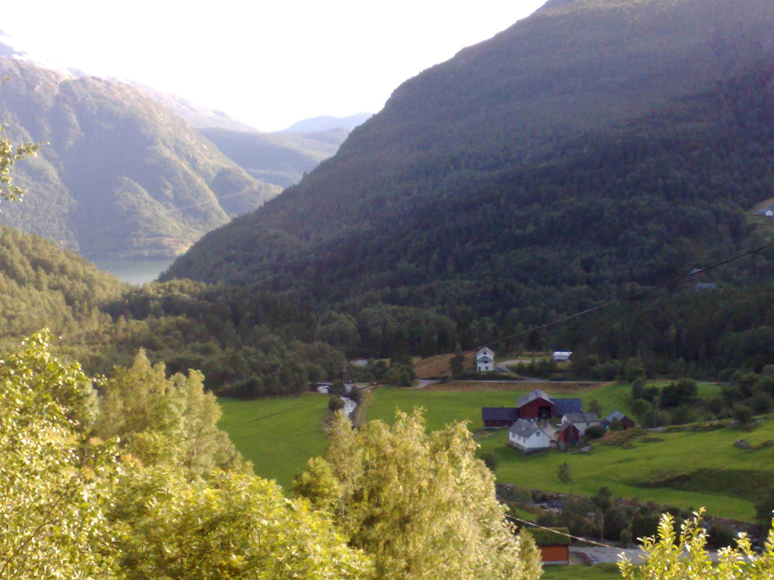 no: Gjetingsdalen i Mauranger i Kvinnherad. Fjorden ein ser lenger framme er Maurangsfjorden